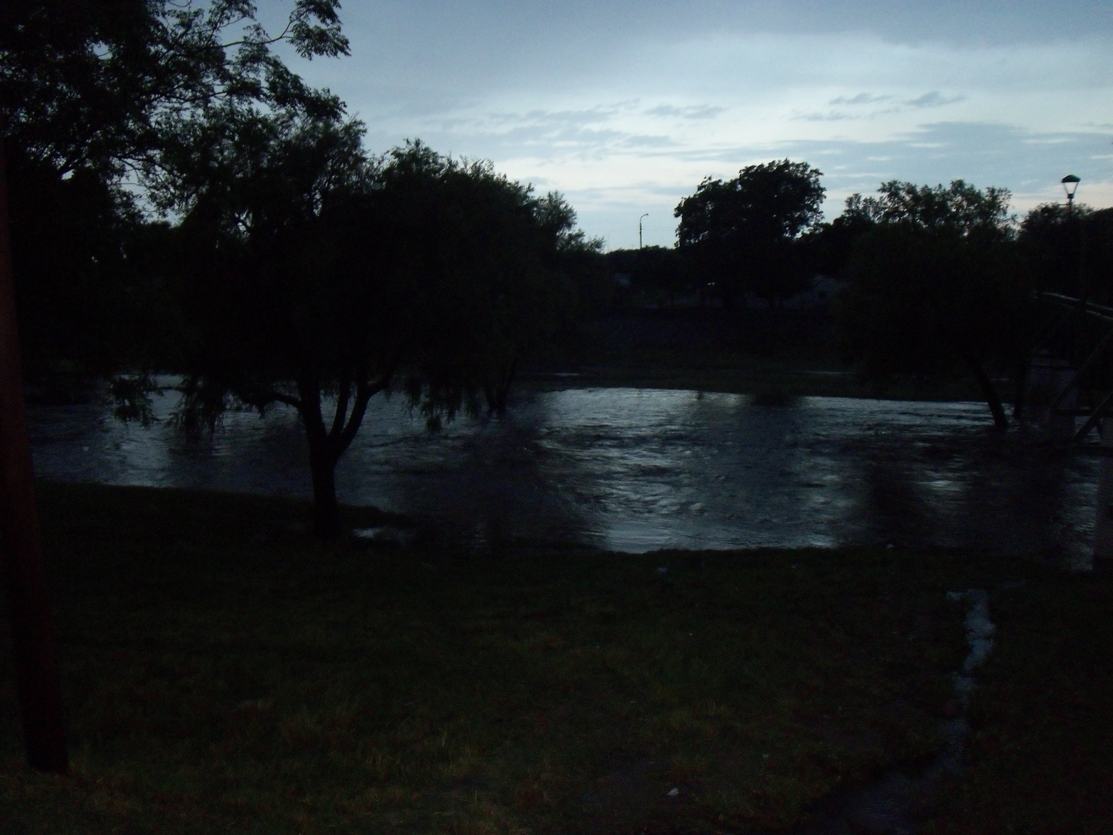 Crecida en el río Cruz del Eje tras la tormenta del pasado martes.